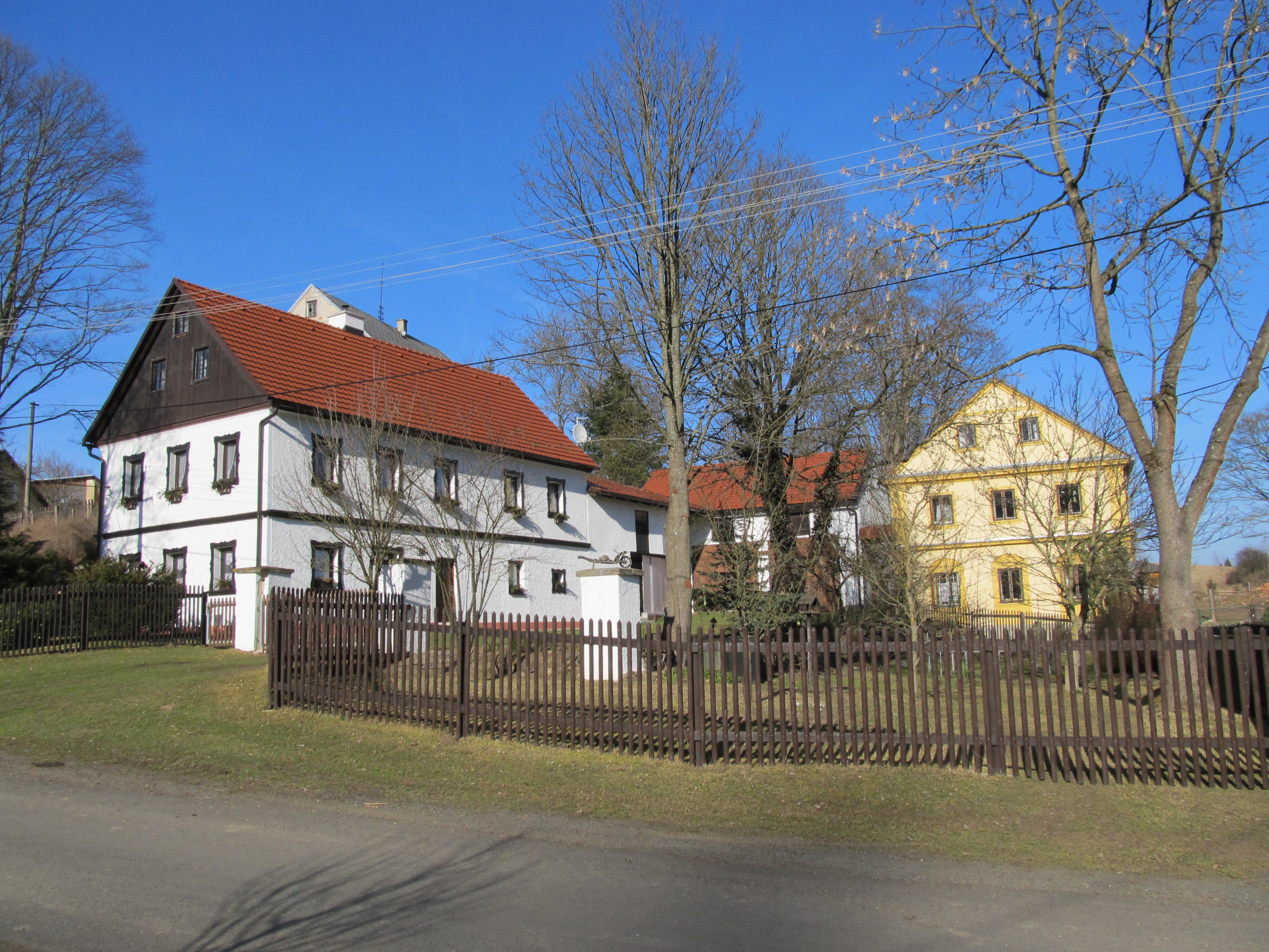 Popovice - usedlosti